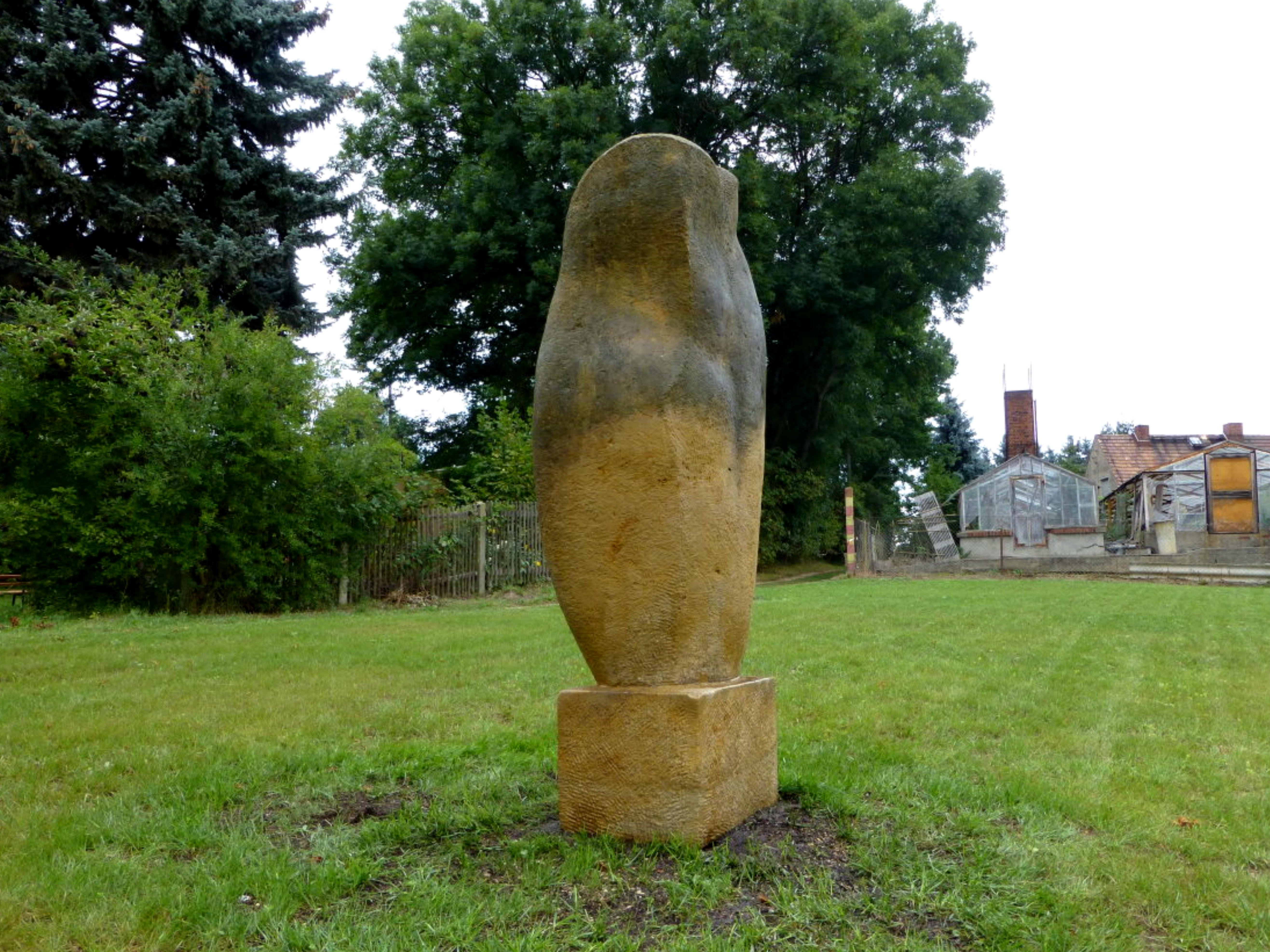 Siebenschläfer Ickowitz (Eva Backofen)